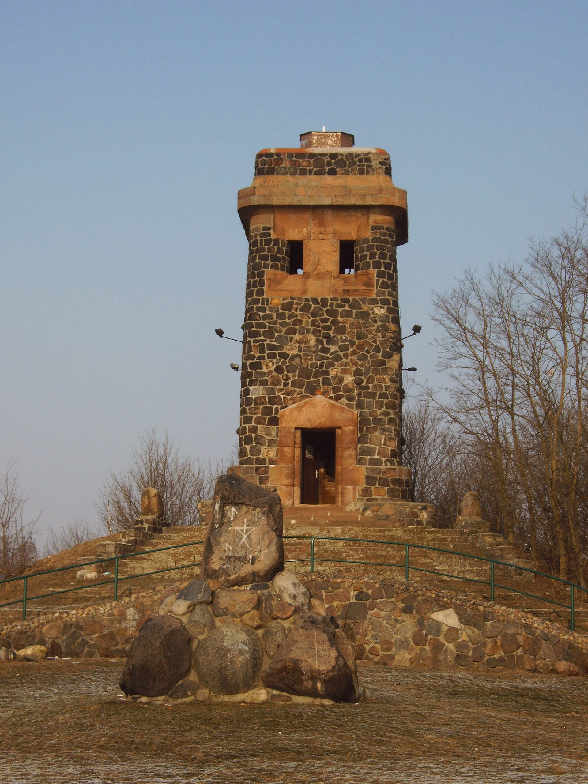 Bismarckturm Schnarsleben (bei Magdeburg, Deutschland) Bild aufgenommen am 26.1.2006 von Olaf Meister